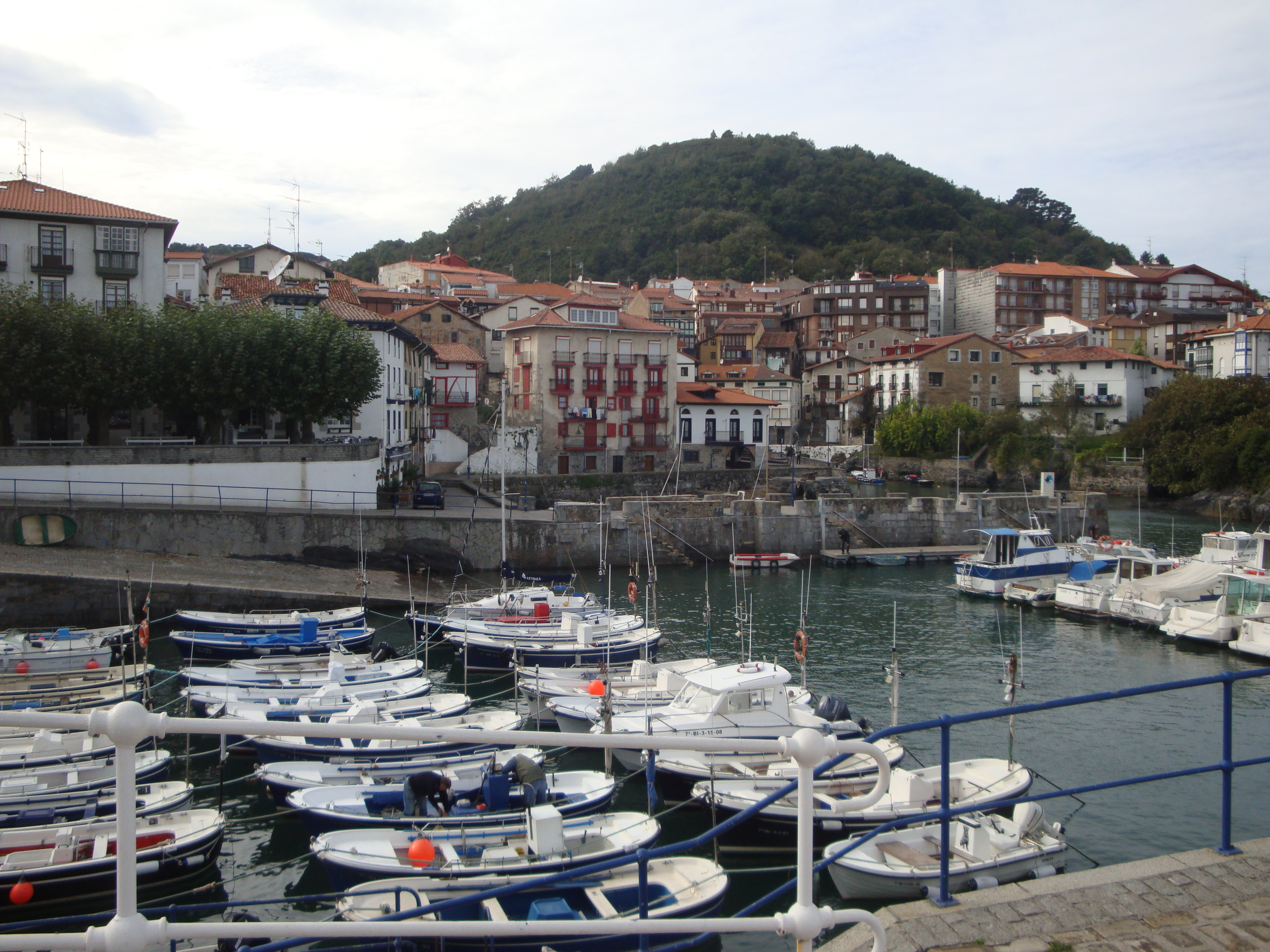 Puetto de Mundaca (Vizcaya)